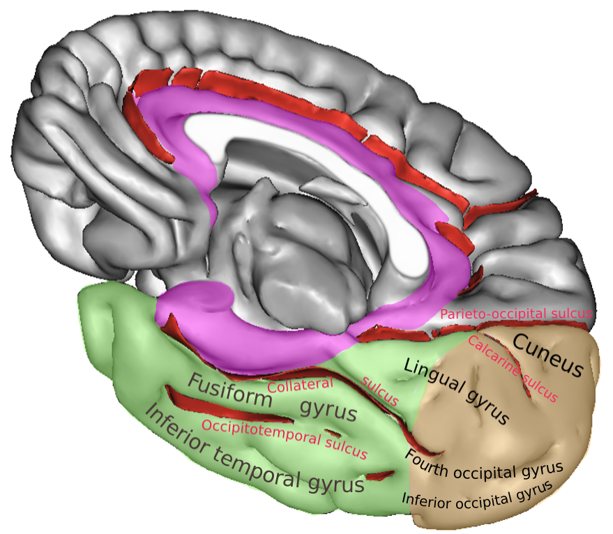 Occipital brain lobe, sulci an gyri.